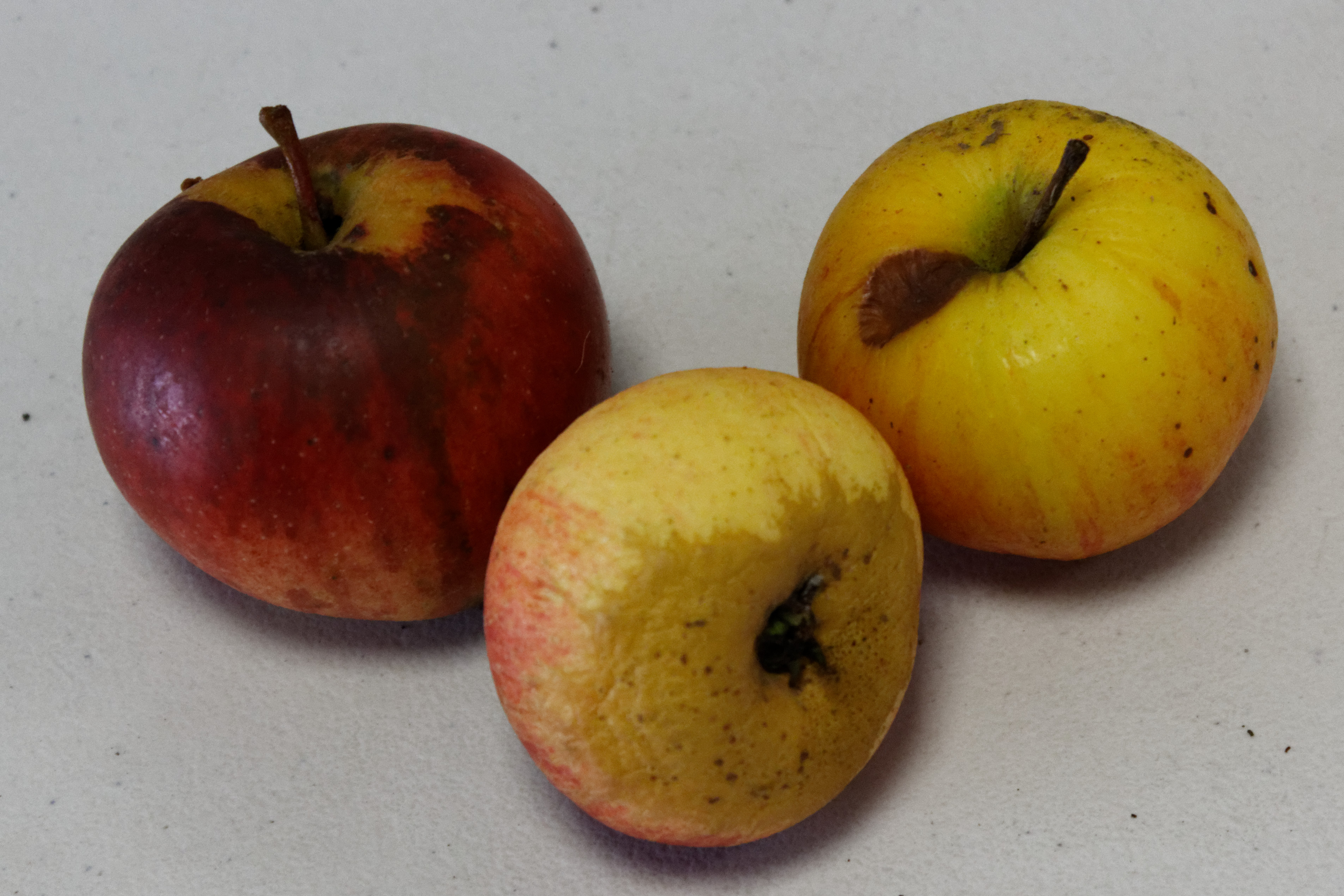 Pomme photographiée à l'OPL Peillac/Les Fougerêts.